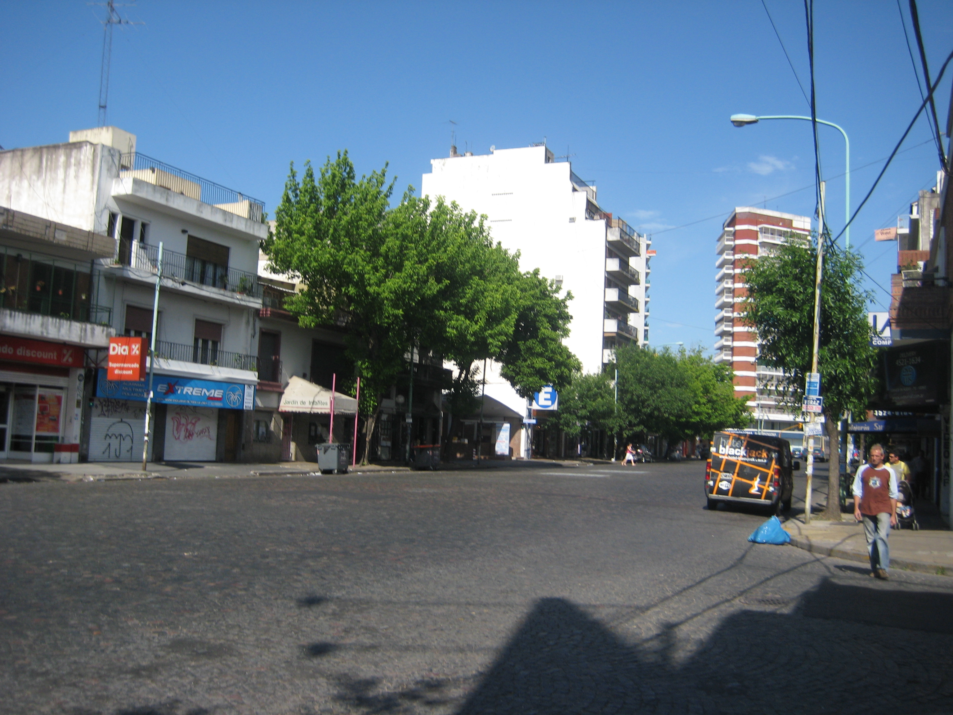 Triumvirato Avenue, Villa Ortúzar, Buenos Aires.